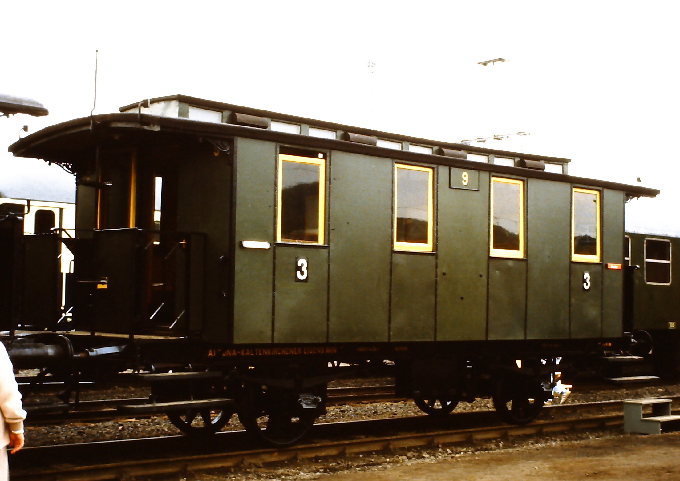 Personenwagen Nr. 9 der Altona-Kaldenkirchener Eisenbahn, ausgestellt auf der Fahrzeugschau 150 Jahre deutsche Eisenbahn in Bochum-Dahlhausen